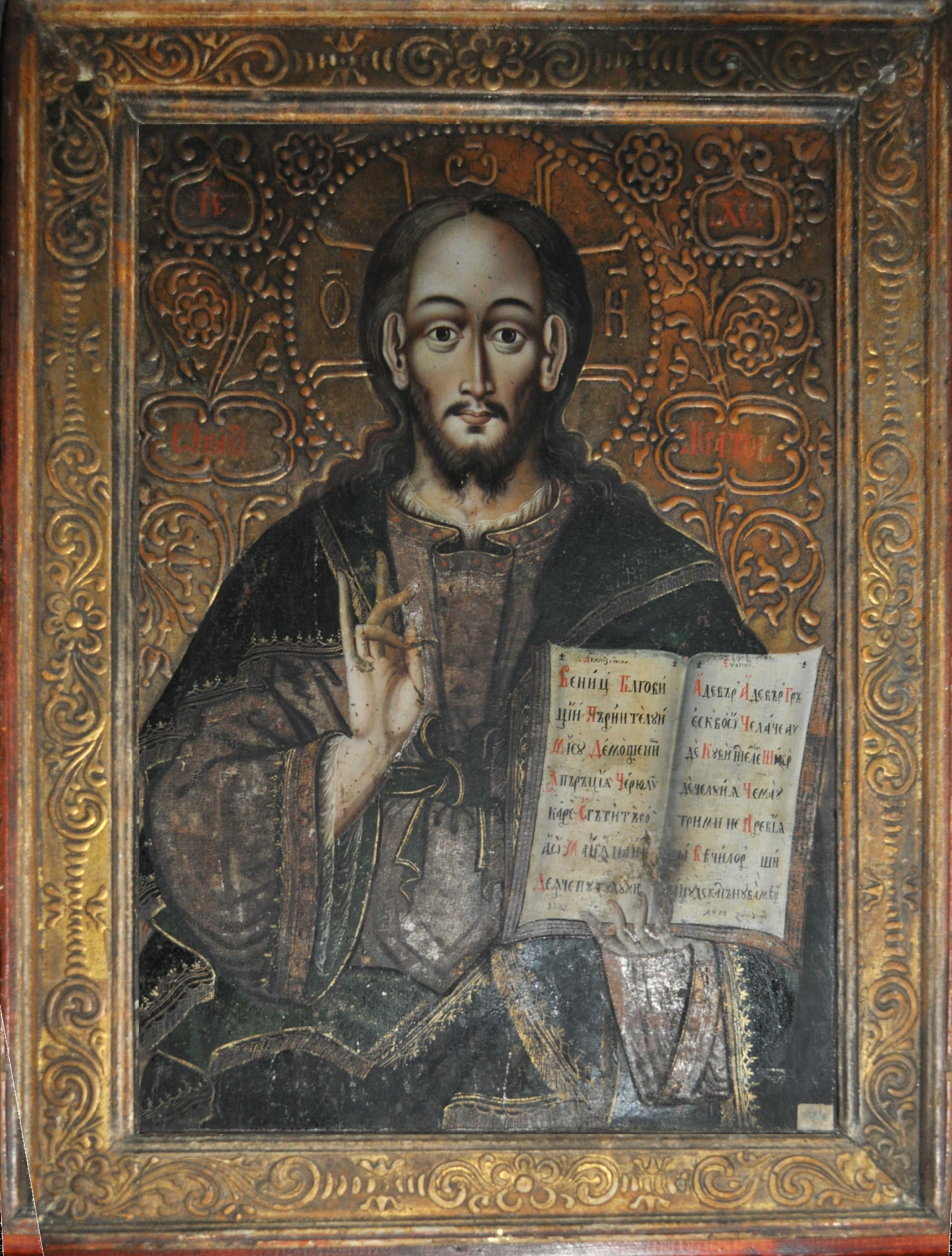 Biserica de lemn „Pogorârea Sf. Duh" din Sartăș, județul Alba